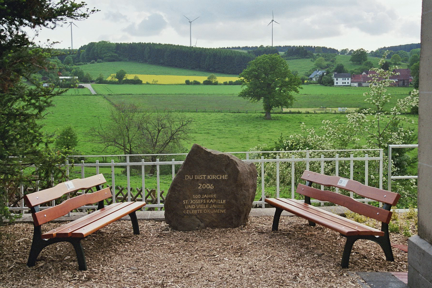 Gedenkstein zum 100-jährigen Bestehen der katholischen Kirche